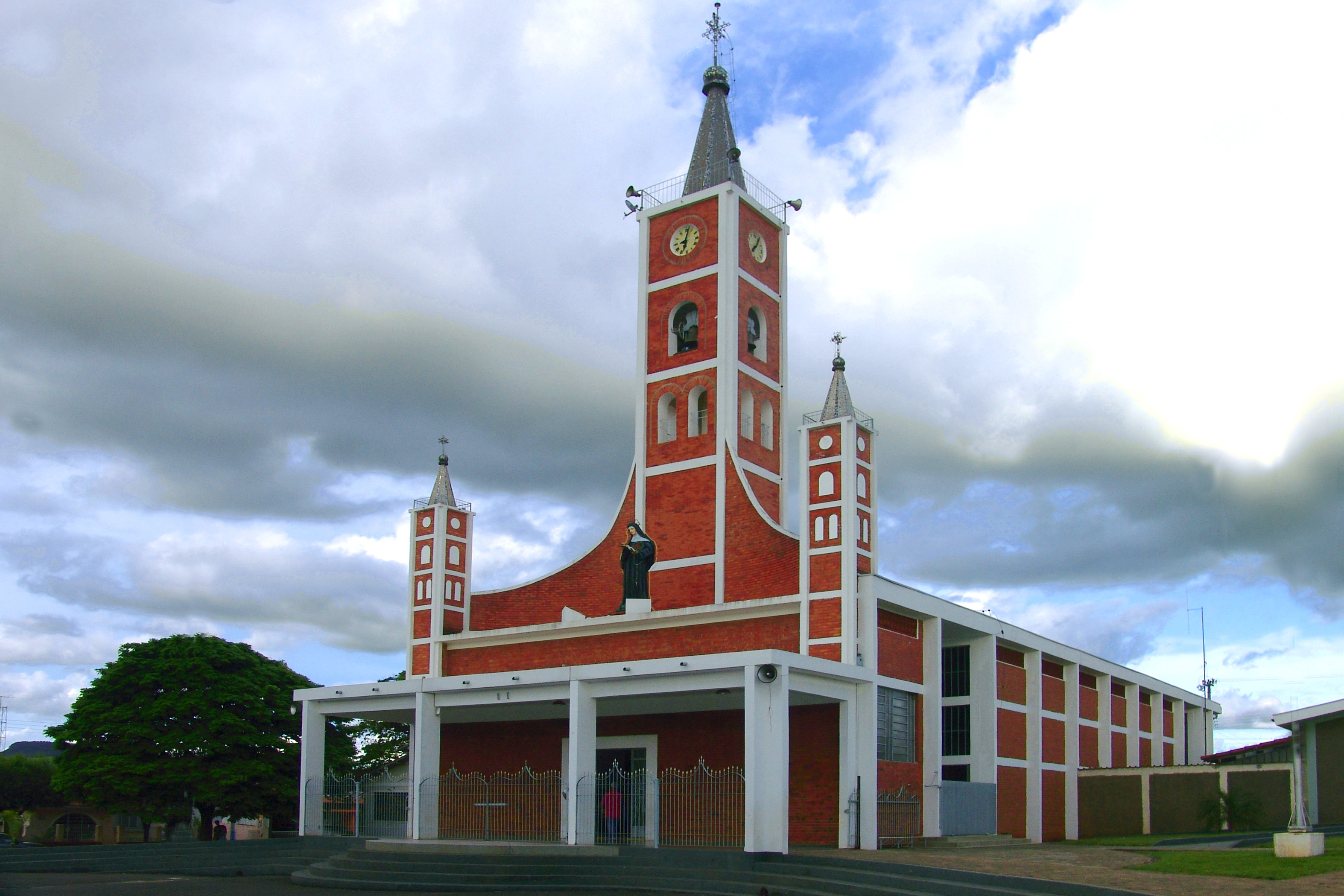 Igreja de Santa Rita no município de Taguaí, São Paulo, Brasil